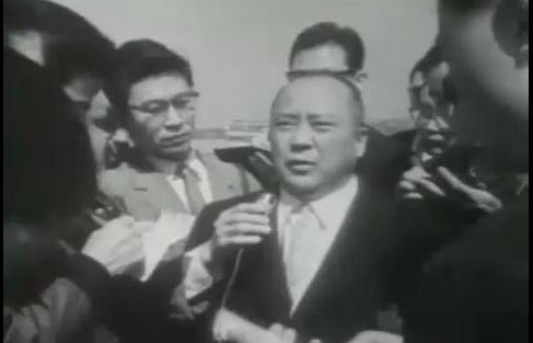 주미 한국 대사 양유찬